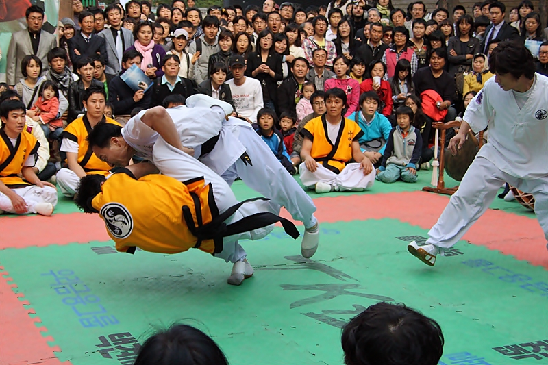 상대편의 찬 발을 잡아 넘어뜨리고 있다